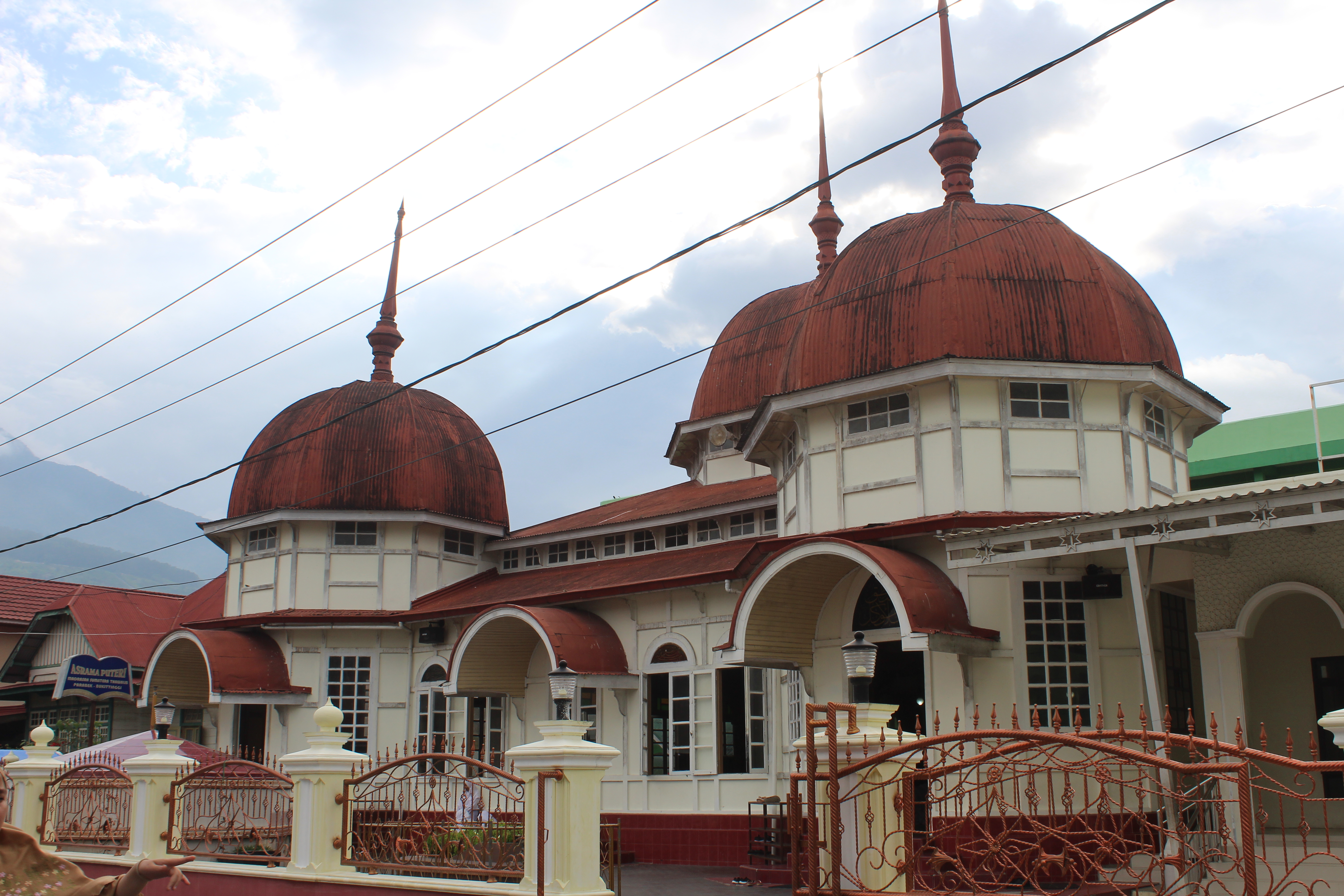 Masjid Jamik Parabek di Jorong Parabek, Nagari Ladang Laweh, Kecamatan Banuhampu, Kabupaten Agam, Sumatra Barat, Indonesia.